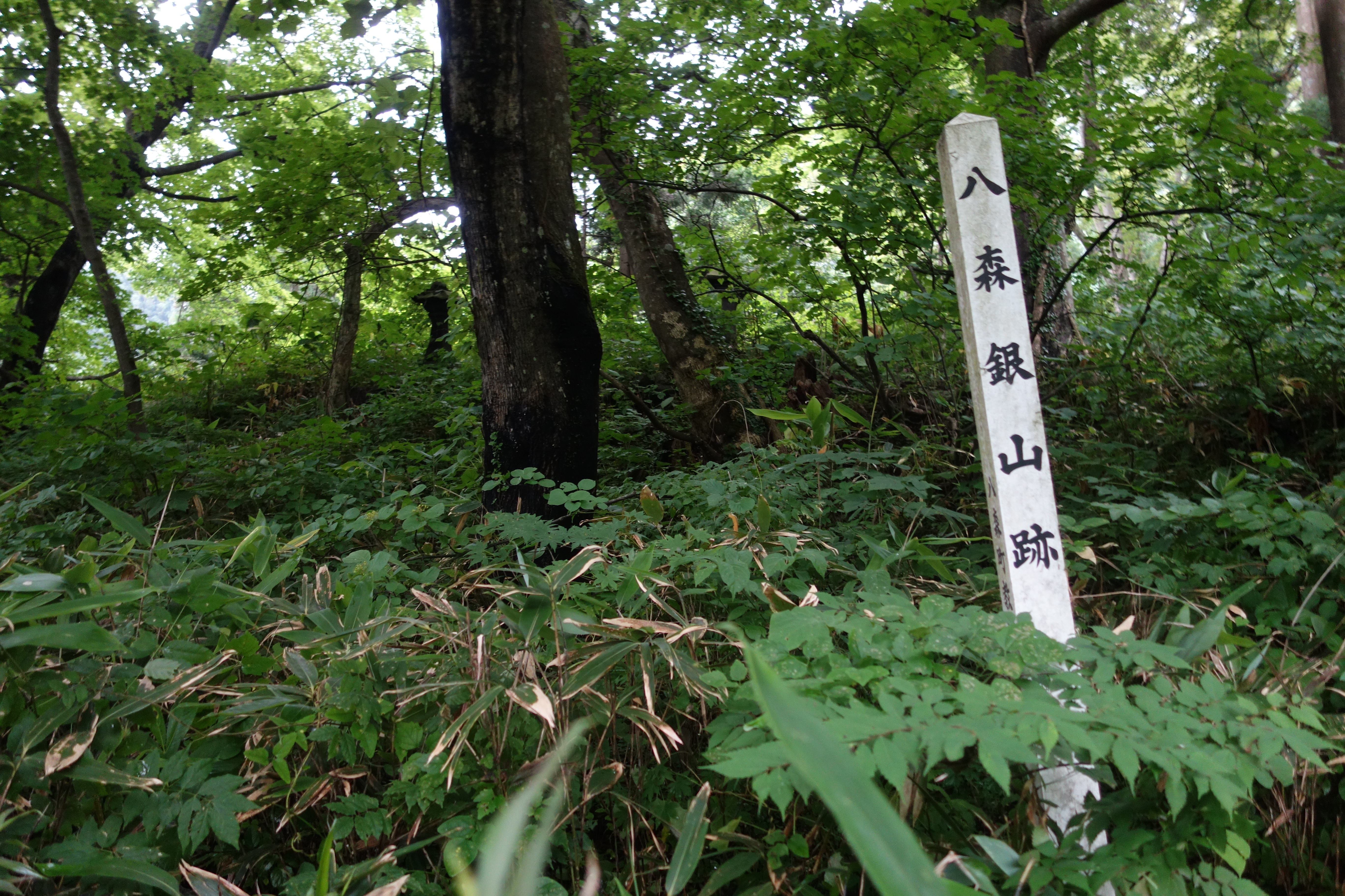 八森銀山跡地 標柱は八森町教育委員会によるもの。 後ろに2基の石灯籠が見える。その後ろに朽ちた「山神さま」のお堂の跡がある。